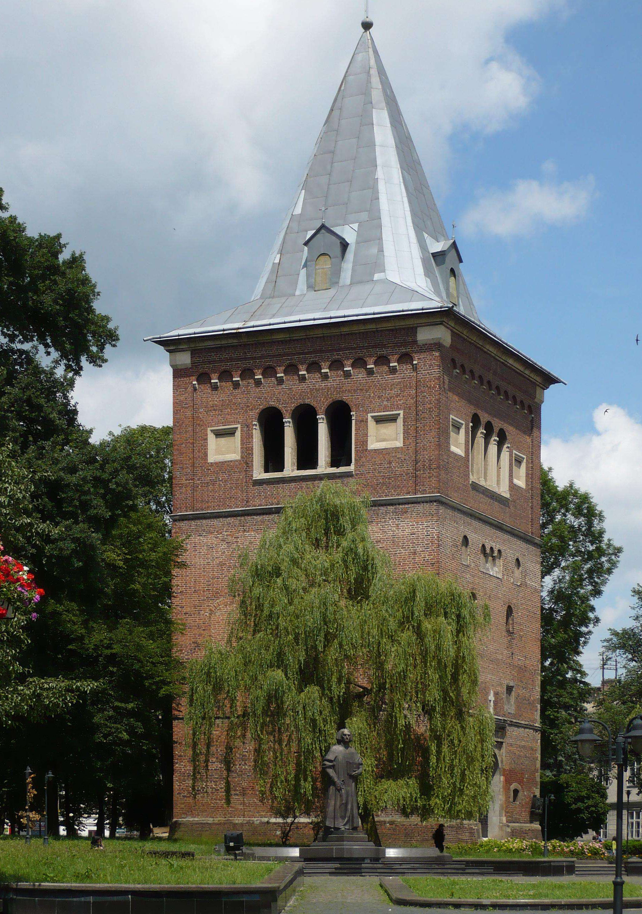 Dzwonnica kościoła